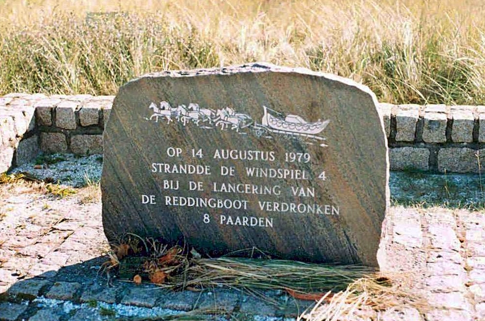 Grave of the horses that died during the launch of the the Ameland lifeboat in 1979